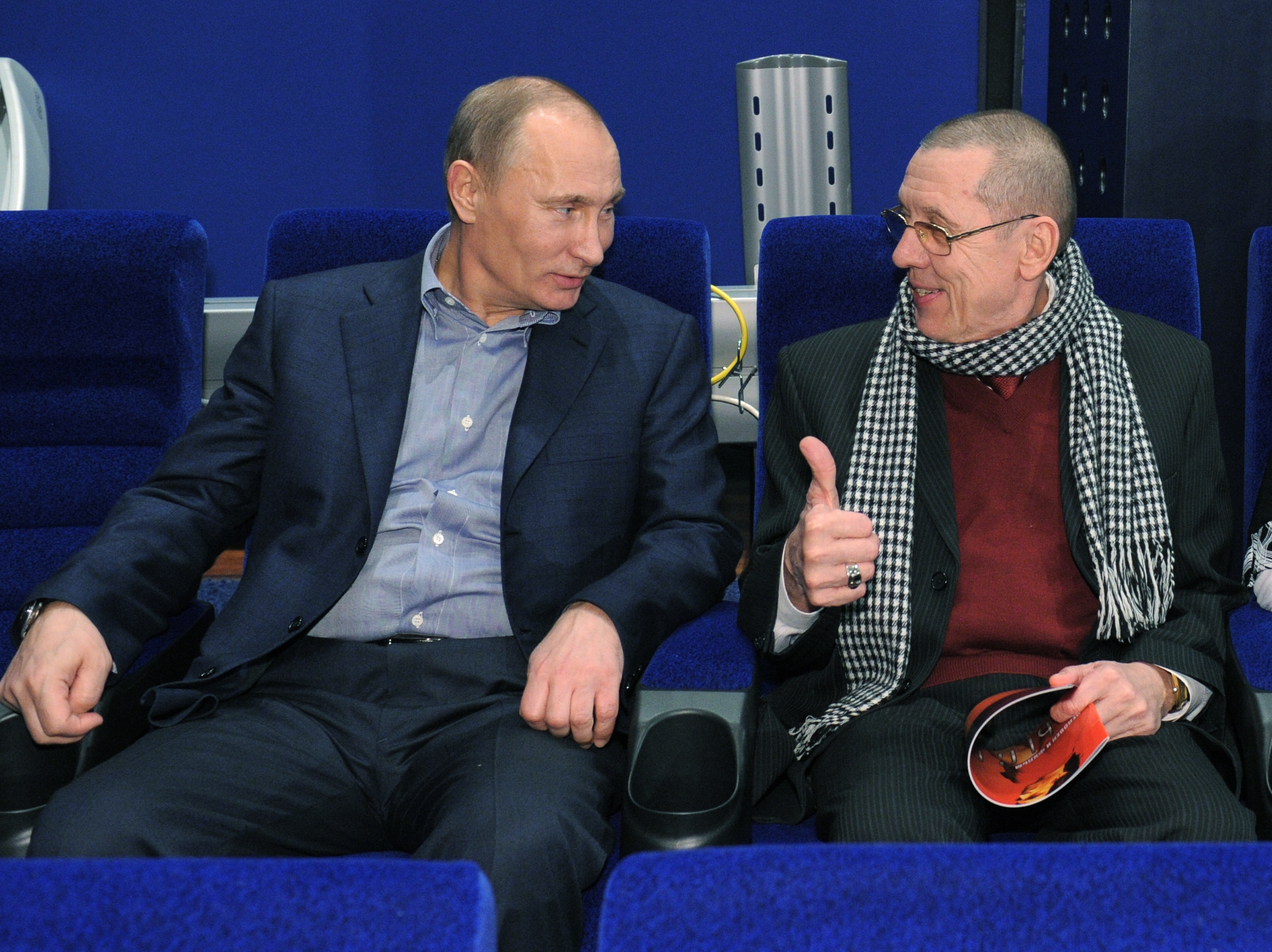 Накануне В. В. Путин посетил киностудию «Мосфильм», где посмотрел новый фильм «Высоцкий. Спасибо, что живой» и встретился со съемочной группой, родственниками и друзьями В. С. Высоцкого